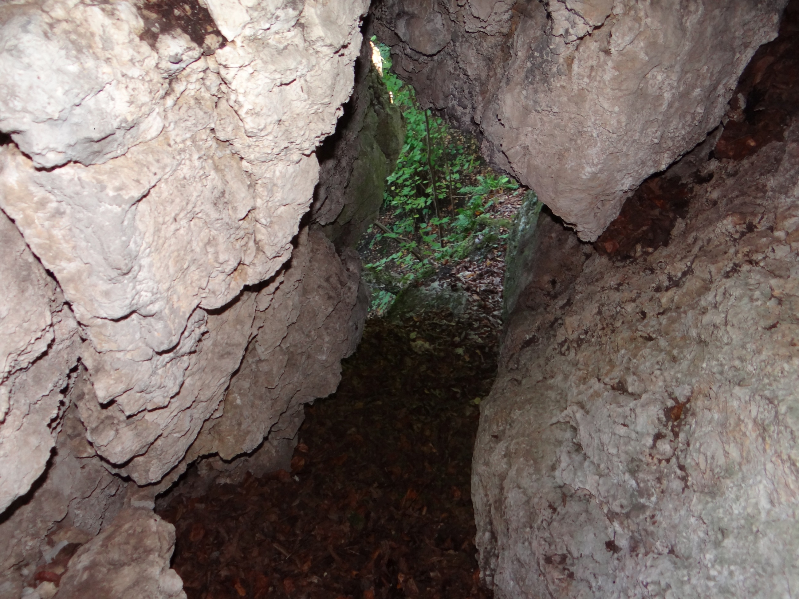 Studnia za Igłą w Skale Gaudynowskiej w dolinie Brodłówki. Widok z otworu na zewnątrz